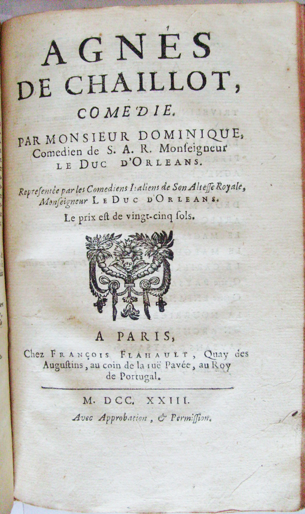 Édition originale de la pièce de théâtre Agnès de Chaillot par Dominique (Fils)(Biancolelli) à Paris chez Flahault en 1723.